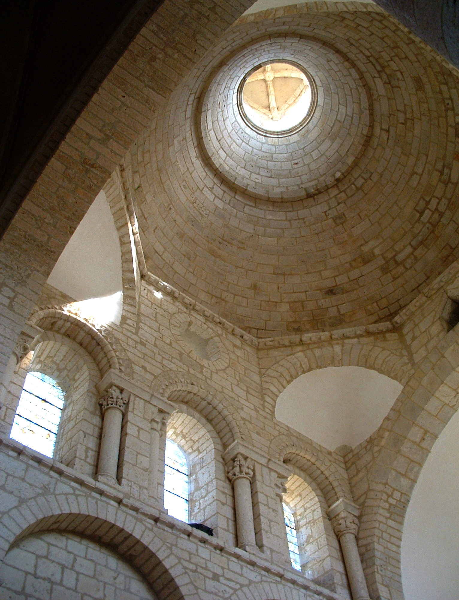 Moirax - Église Notre-Dame - Coupole du choeur